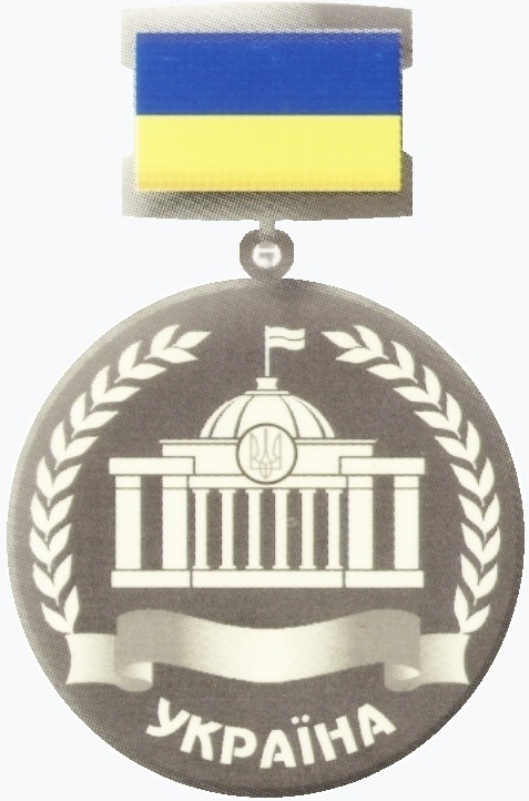 Нагрудный знак к Грамоте Верховной Рады Украины